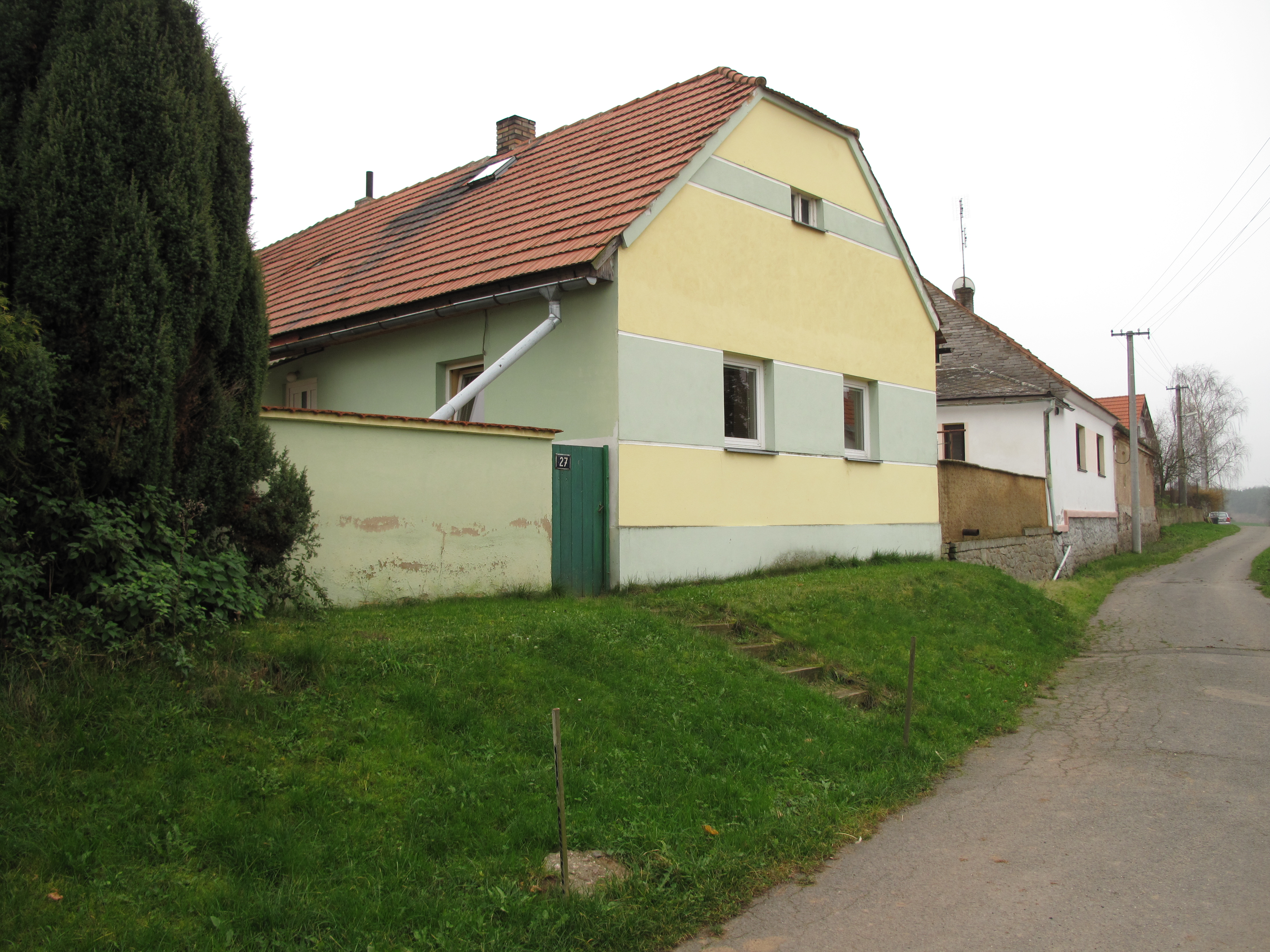 Dům v Hostokryjích. Okres Rakovník, Česká republika.